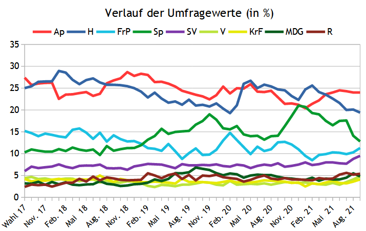 Umfragen zur Parlamentswahl in Norwegen 2021